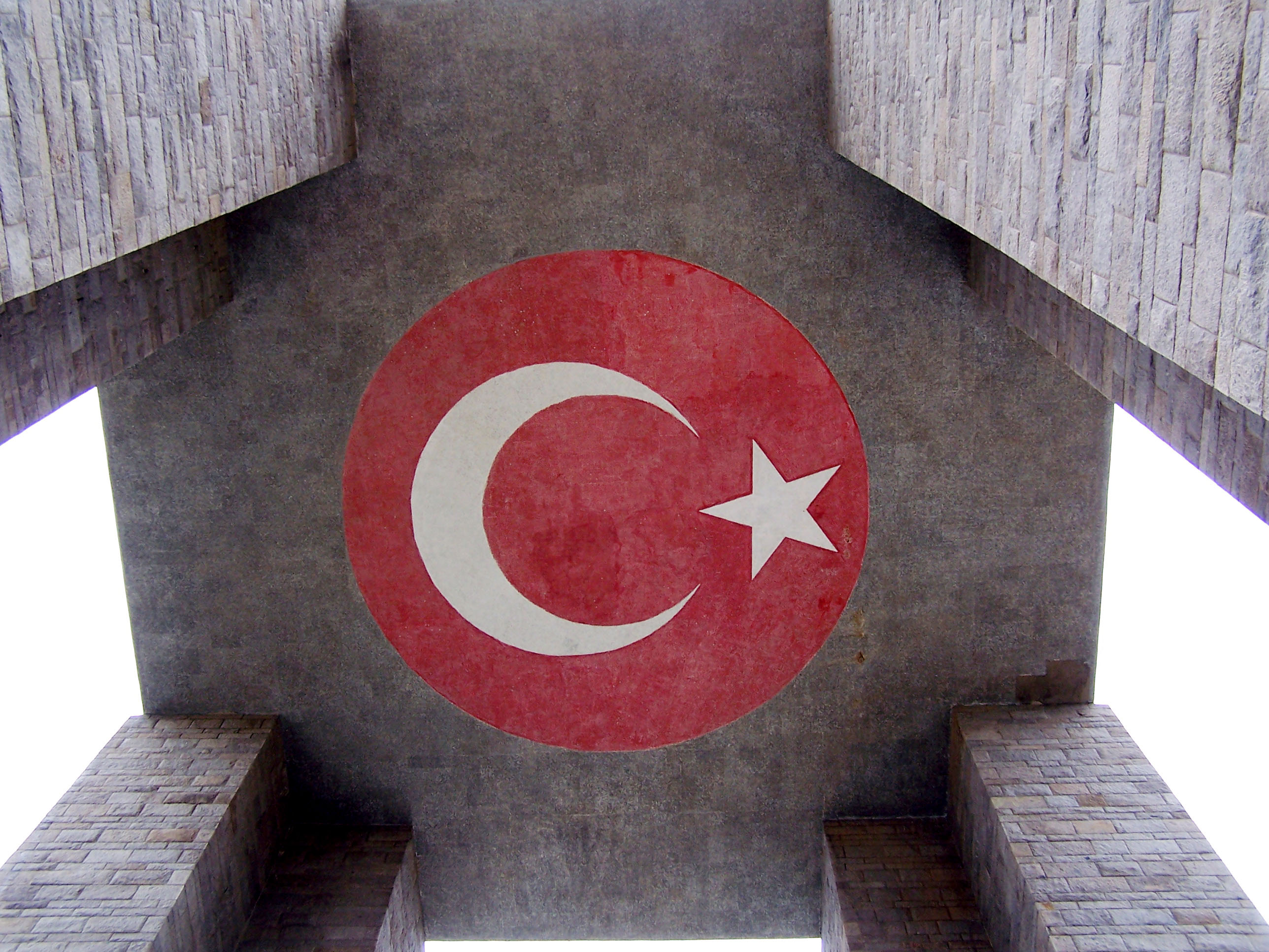 Turkish flag on the Şehitler Abidesi in Çanakkale, Turkey